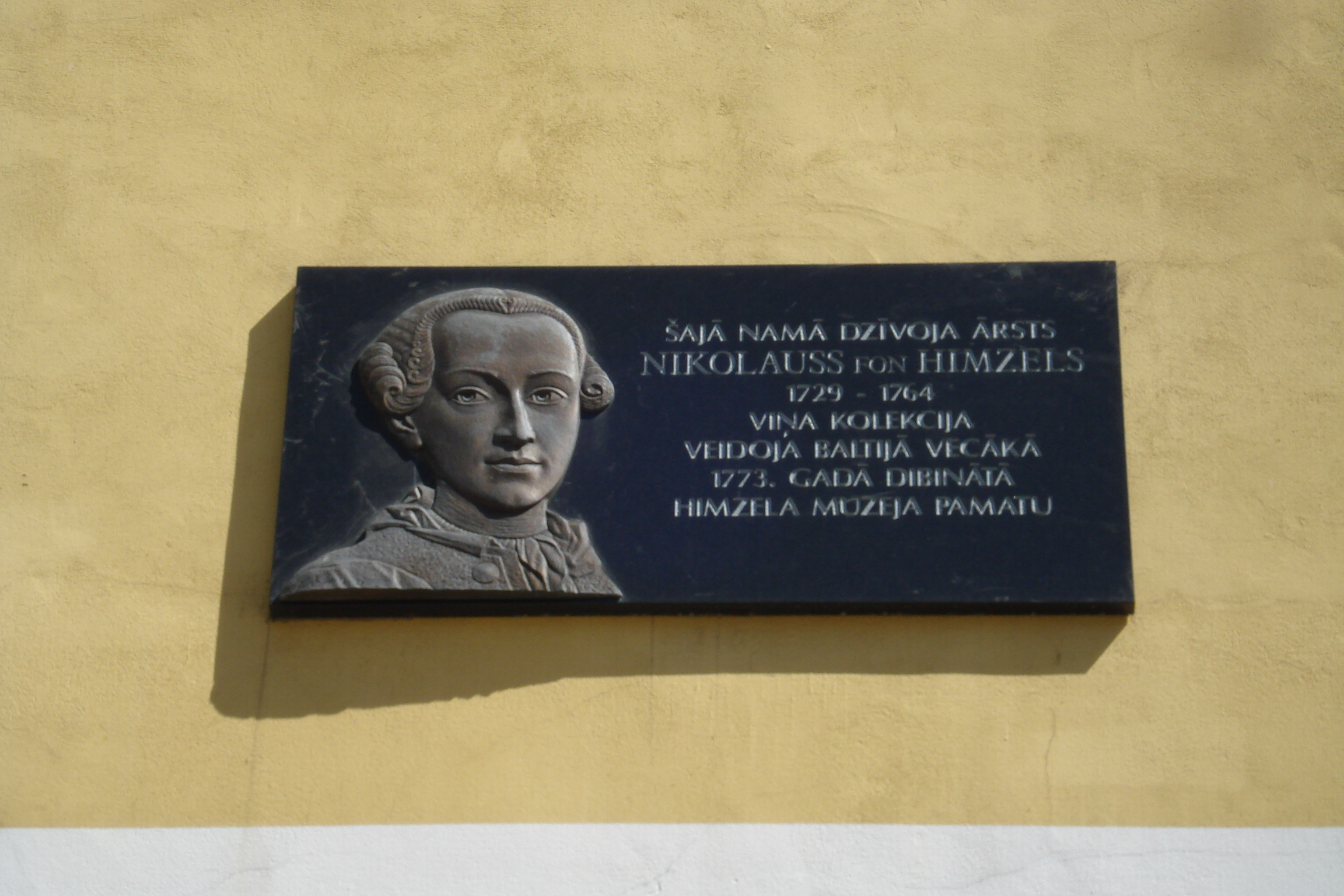 Rīga, Mazā Jauniela, 5. The plaque in memory of Riga physician Nikolaus von Himsel (Rīgas ārsts Nikolauss fon Himzels, 1729—1764)